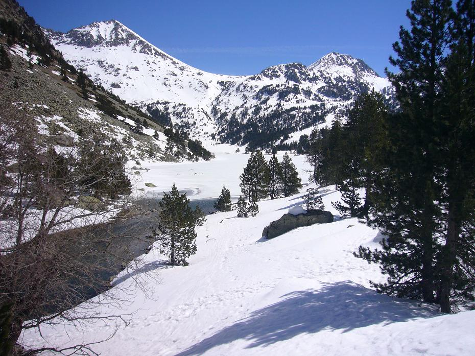 Estany Llong; la Vall de Boí, Alta Ribagorça, Catalunya